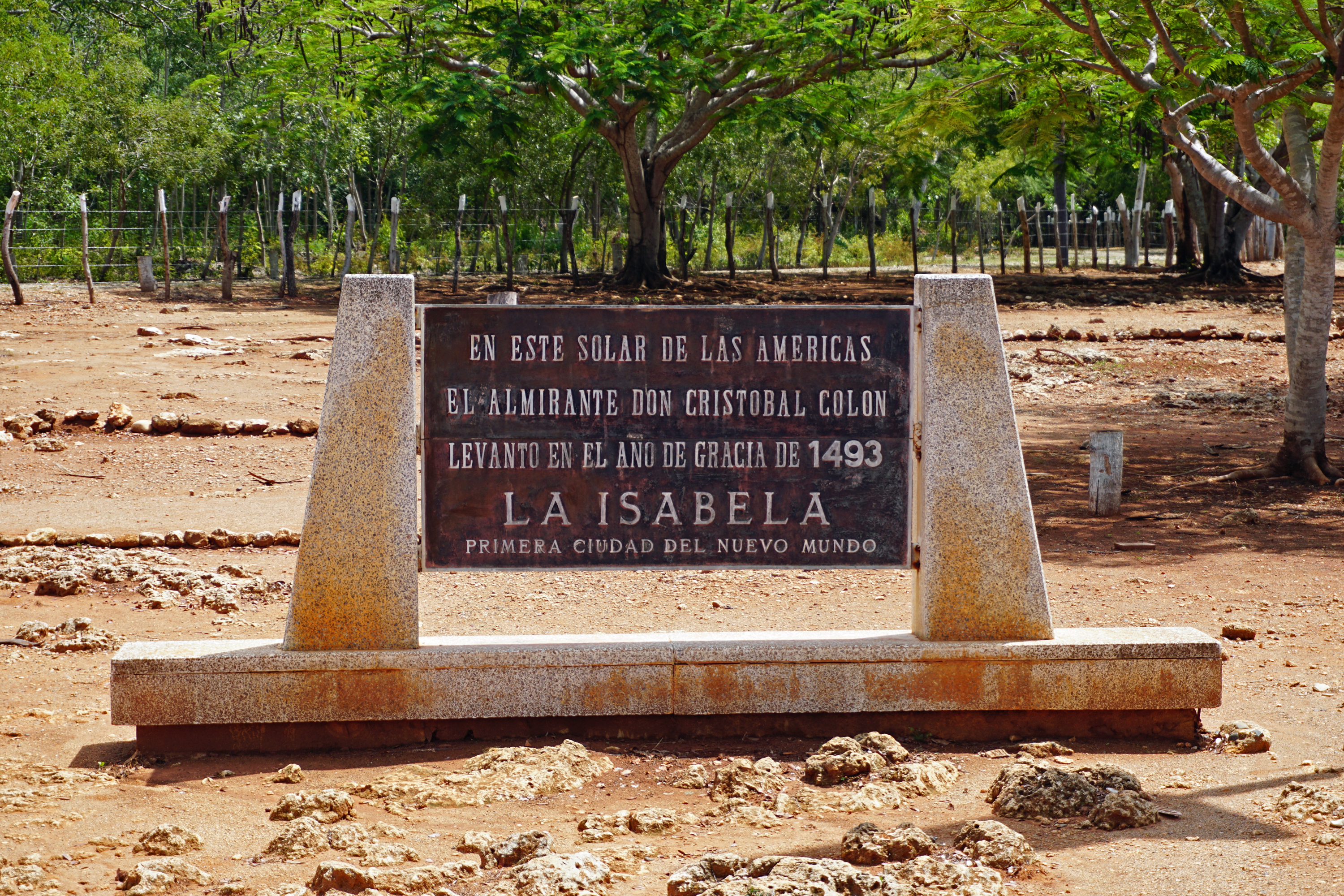 Placa descriptival del Parque Nacional Histórico y Arqueológico de La Isabela, Luperón, República Dominicana